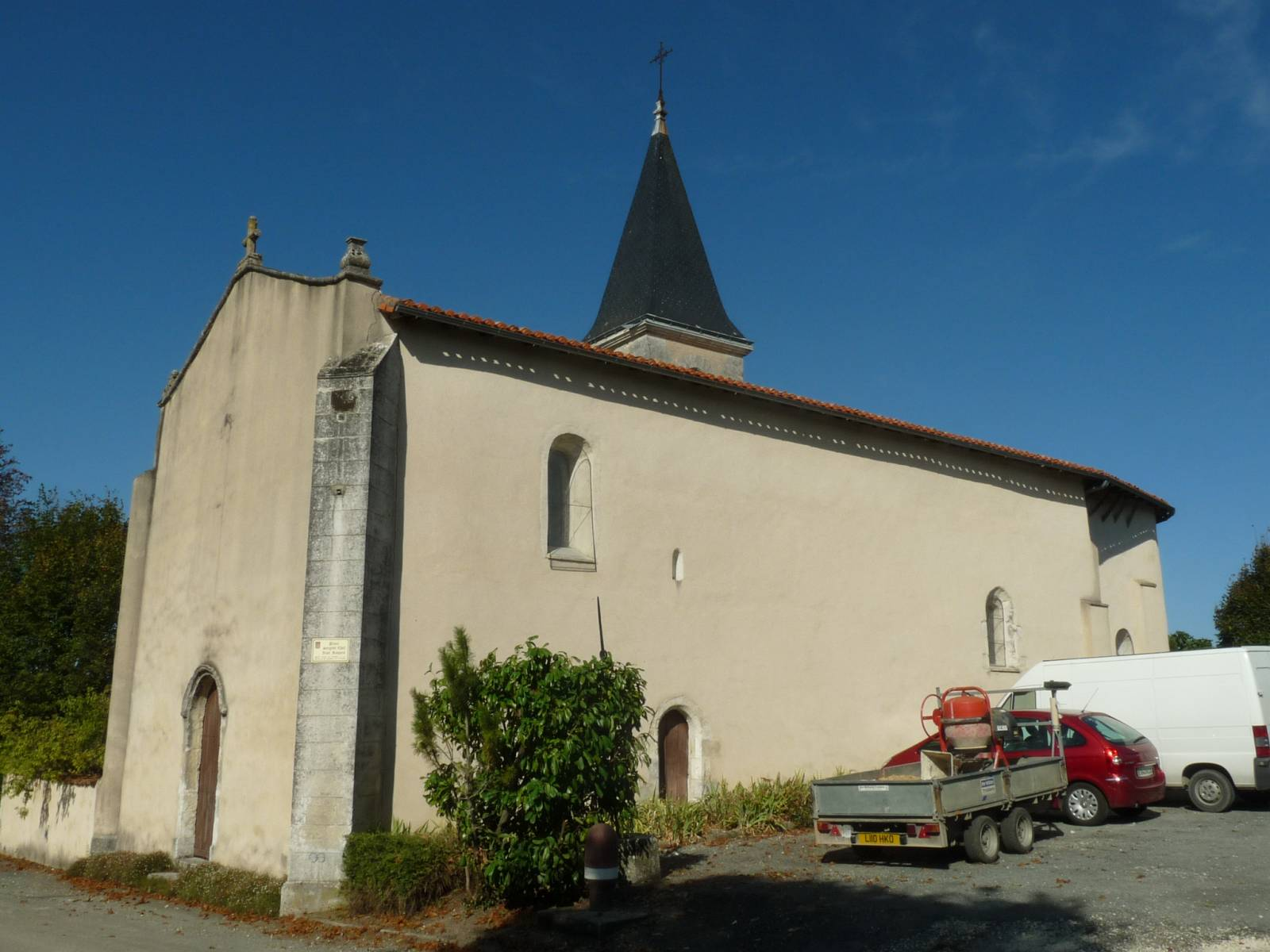 église de Bellon (16), France